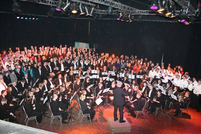 Korenfestival